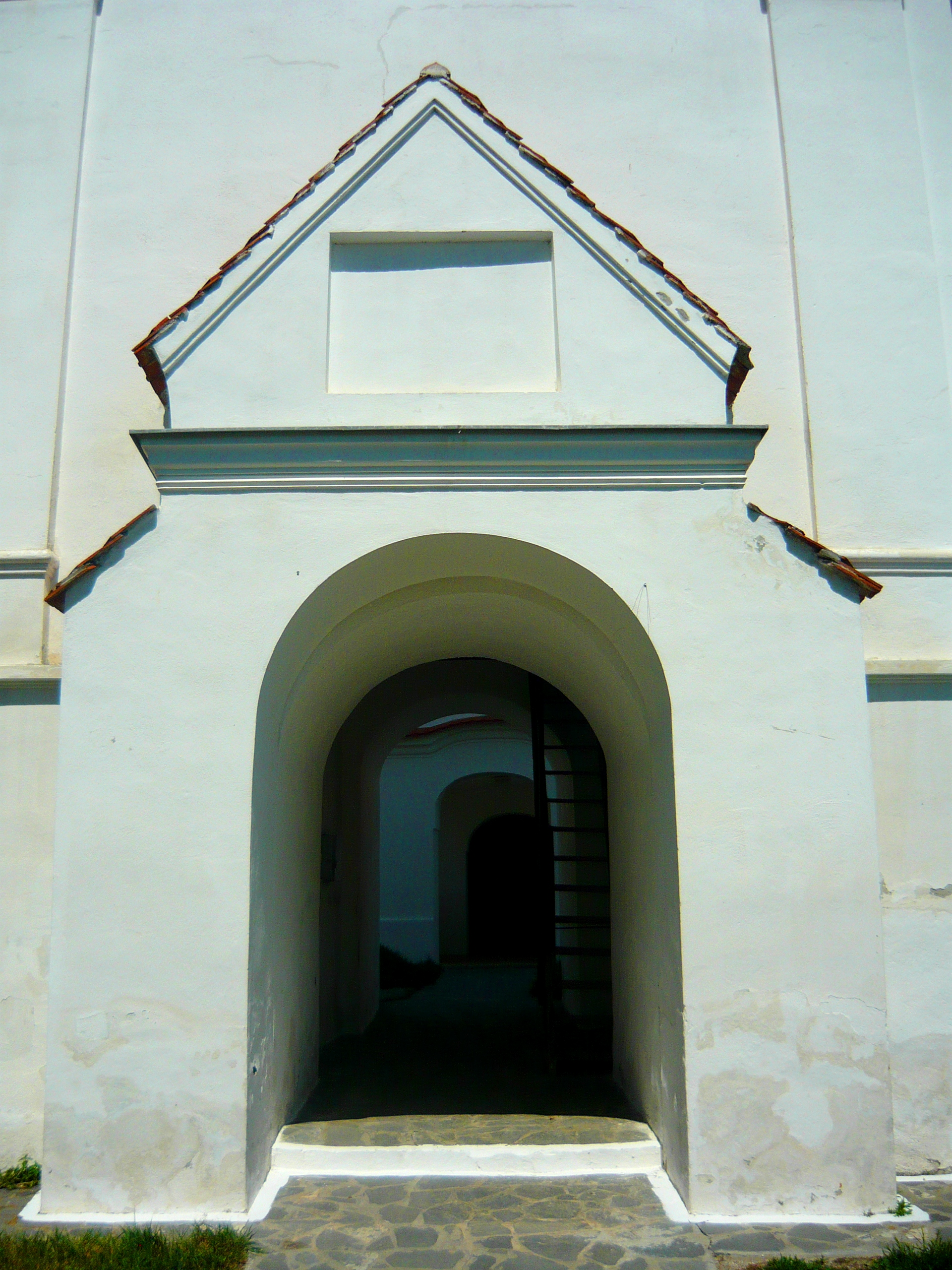 Incintă interioară (fragmente), cu turn- clopotniță. Ilieni, Jud. Covasna,Portal Turn Incinta a doua de apărare. 02